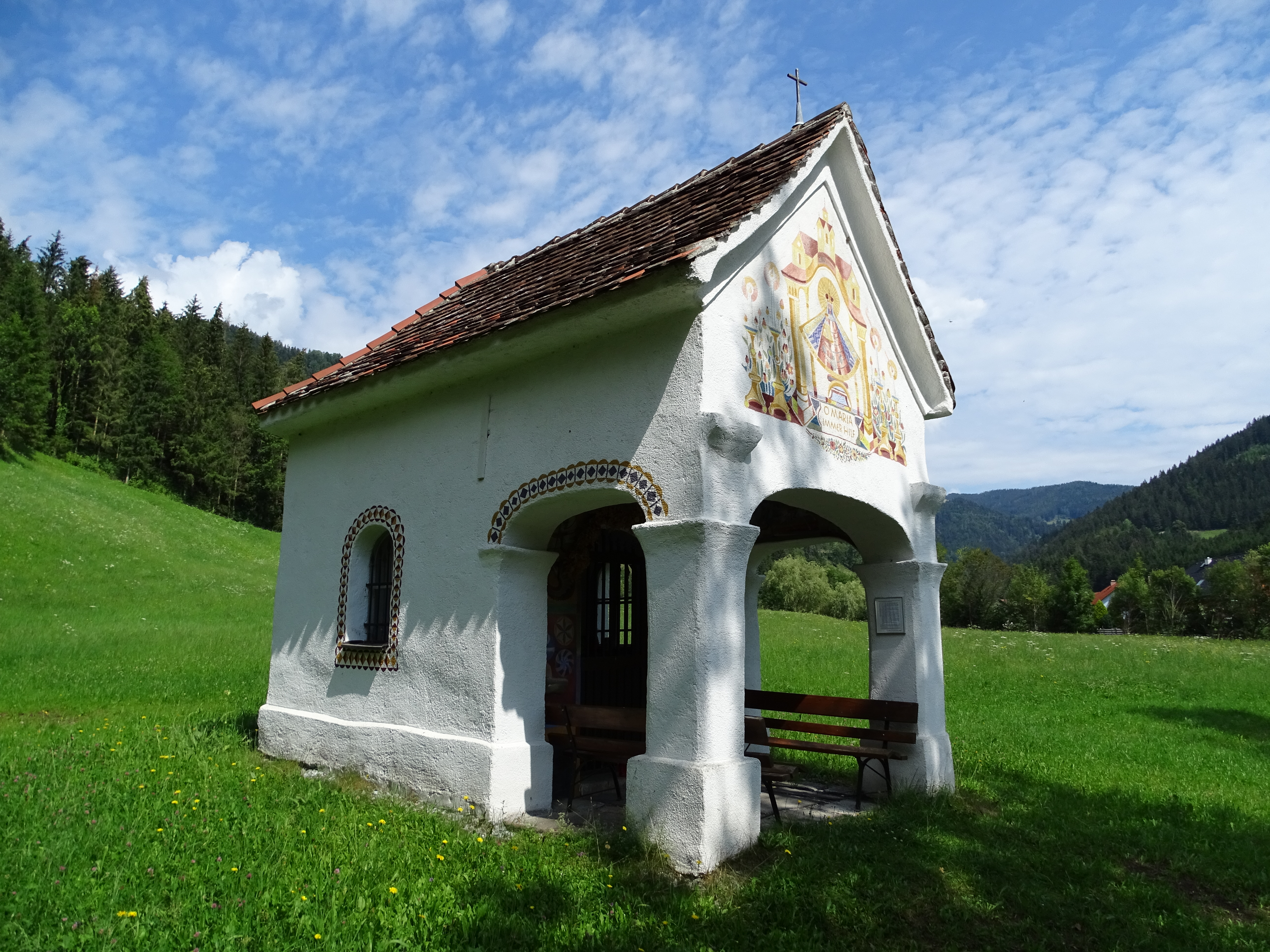 Die 1970 von Franz Weiss neu gestaltete Walcher-Kapelle in Gallmannsegg